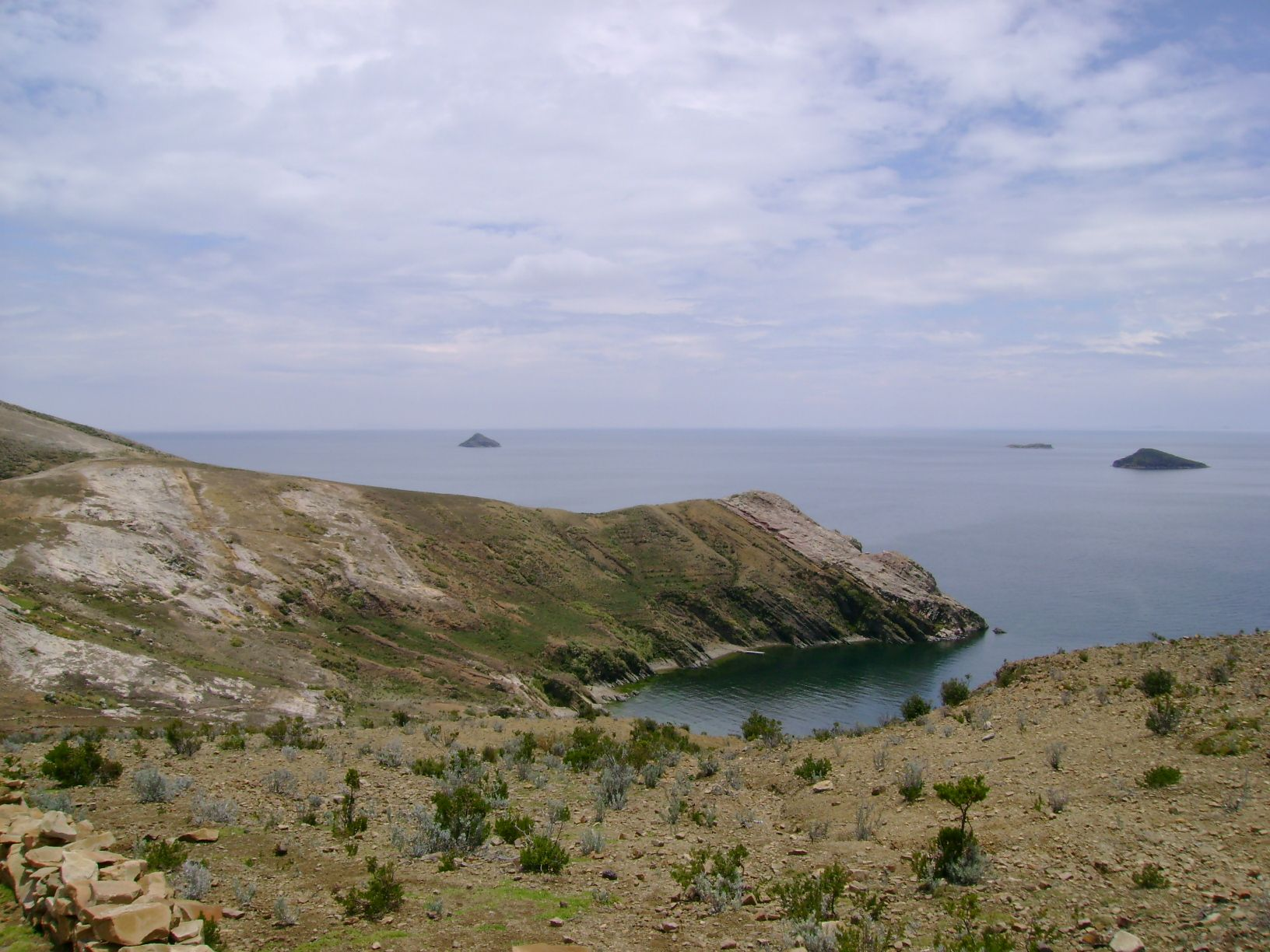 Foto tirada por mim, na Isla del Sol.